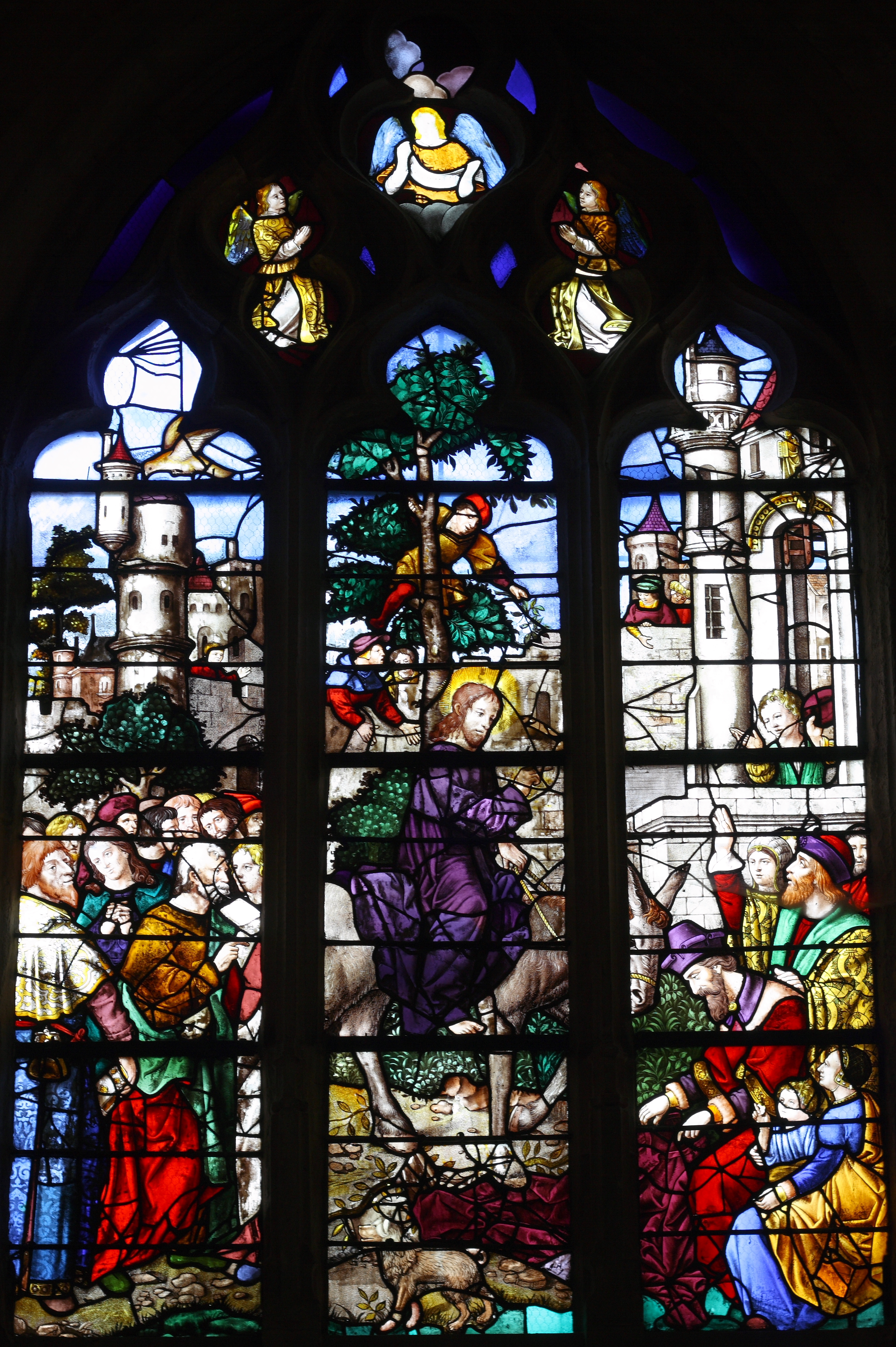 Katholische Pfarrkirche Saint-Martin in Triel-sur-Seine, einer Gemeinde im Département Yvelines (Île-de-France), Bleiglasfenster aus dem 16. Jahrhundert, Darstellung: Einzug in Jerusalem